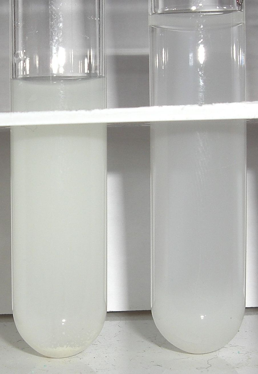 Silberbromid